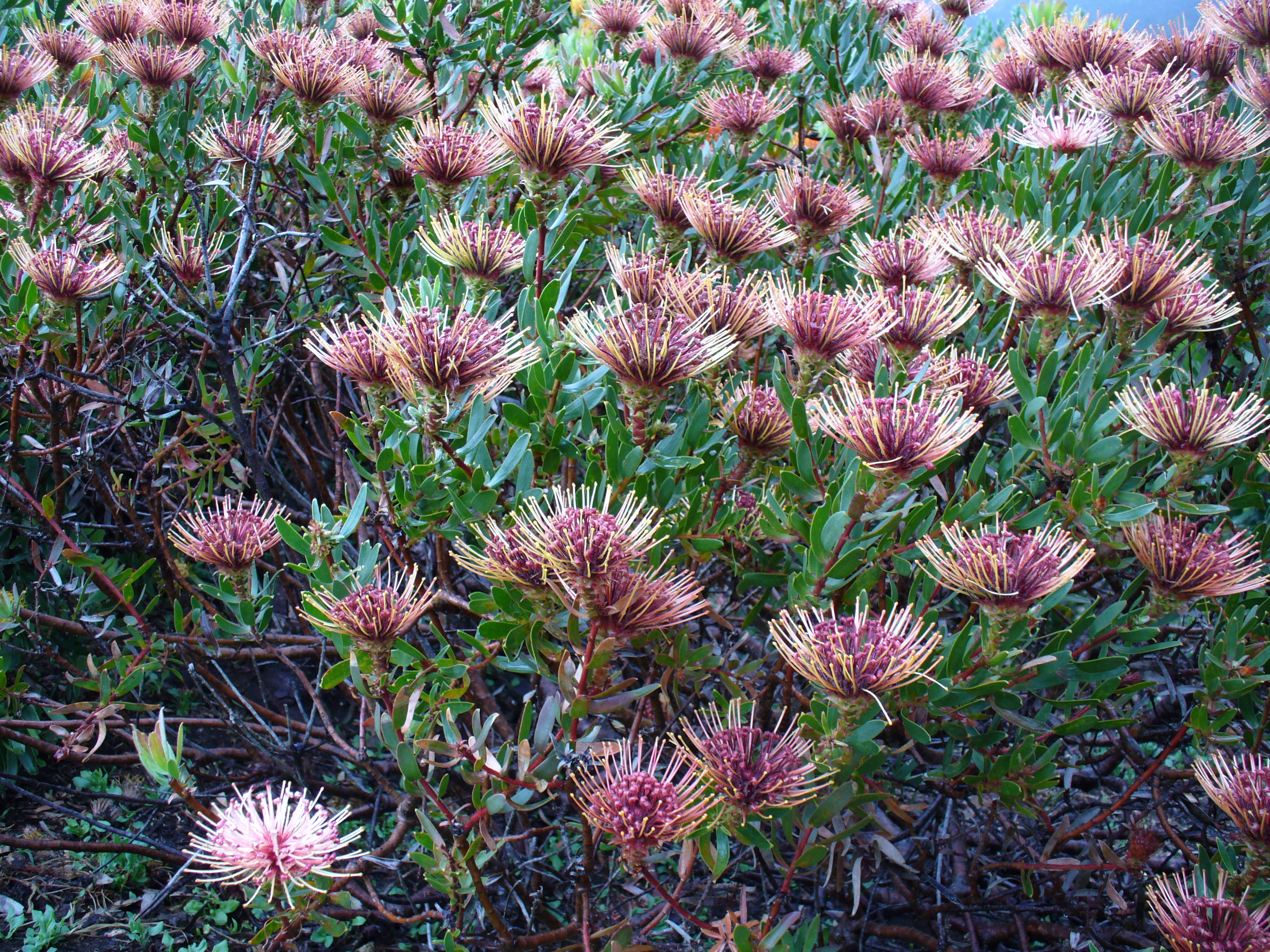 Leucospermum tottum var. glabrum bush